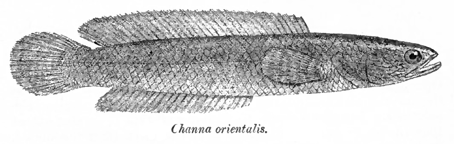 Channa orientalis Bloch & Schneider, 1801